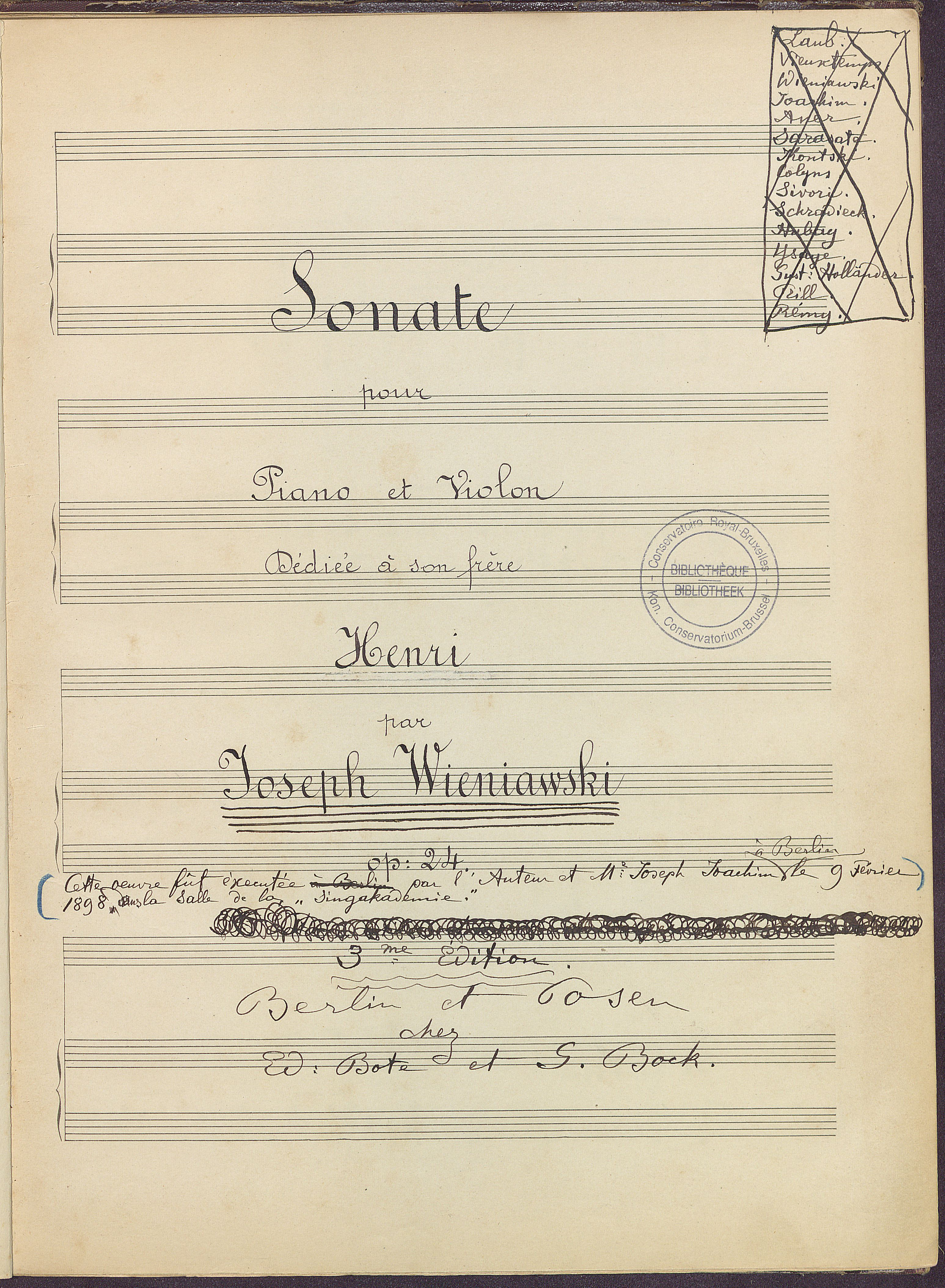 Page de garde de la Sonate pour piano et violon, op. 24, dédiée à Henryk Wieniawski